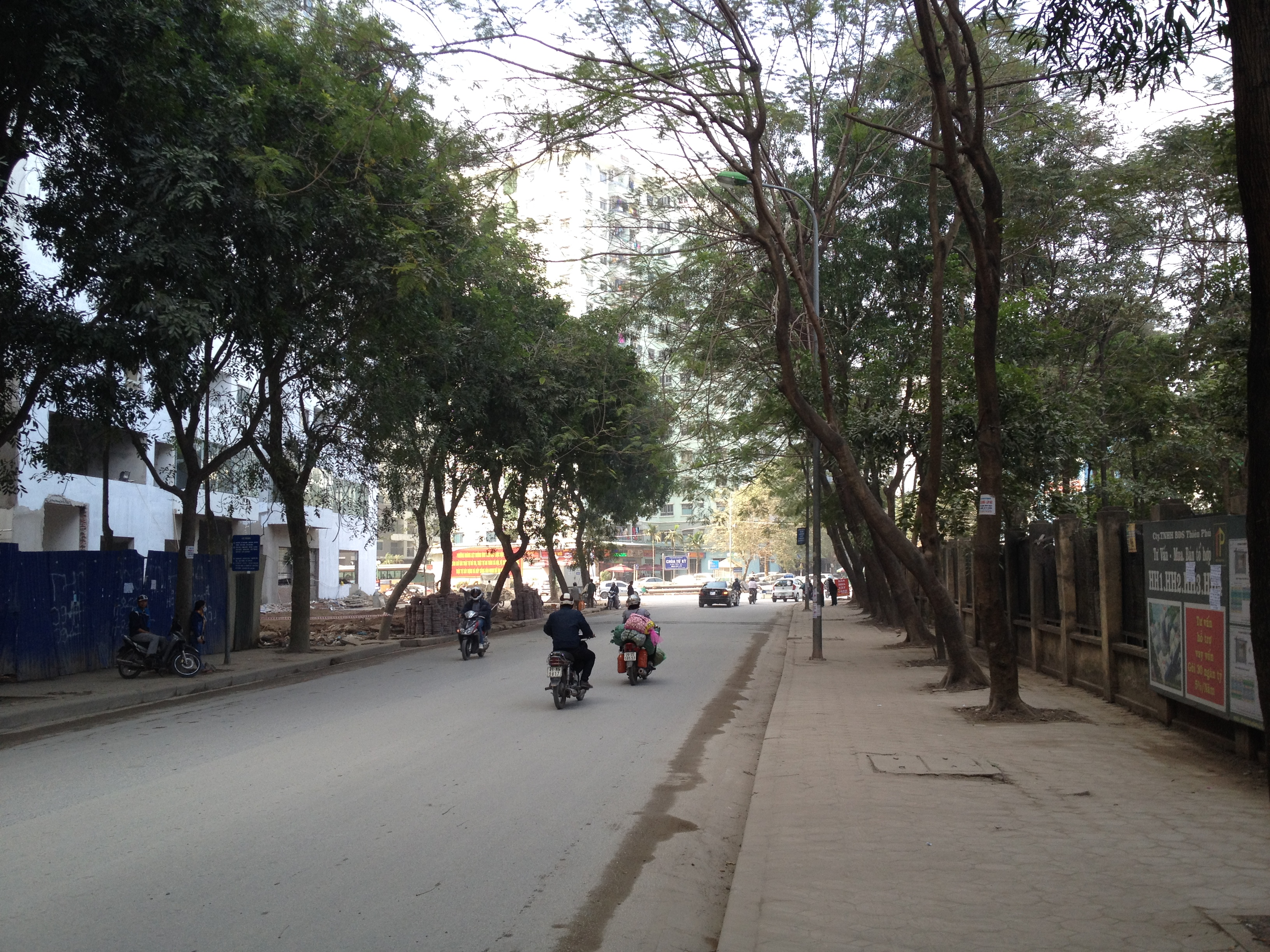 Hà Nội, Việt Nam.